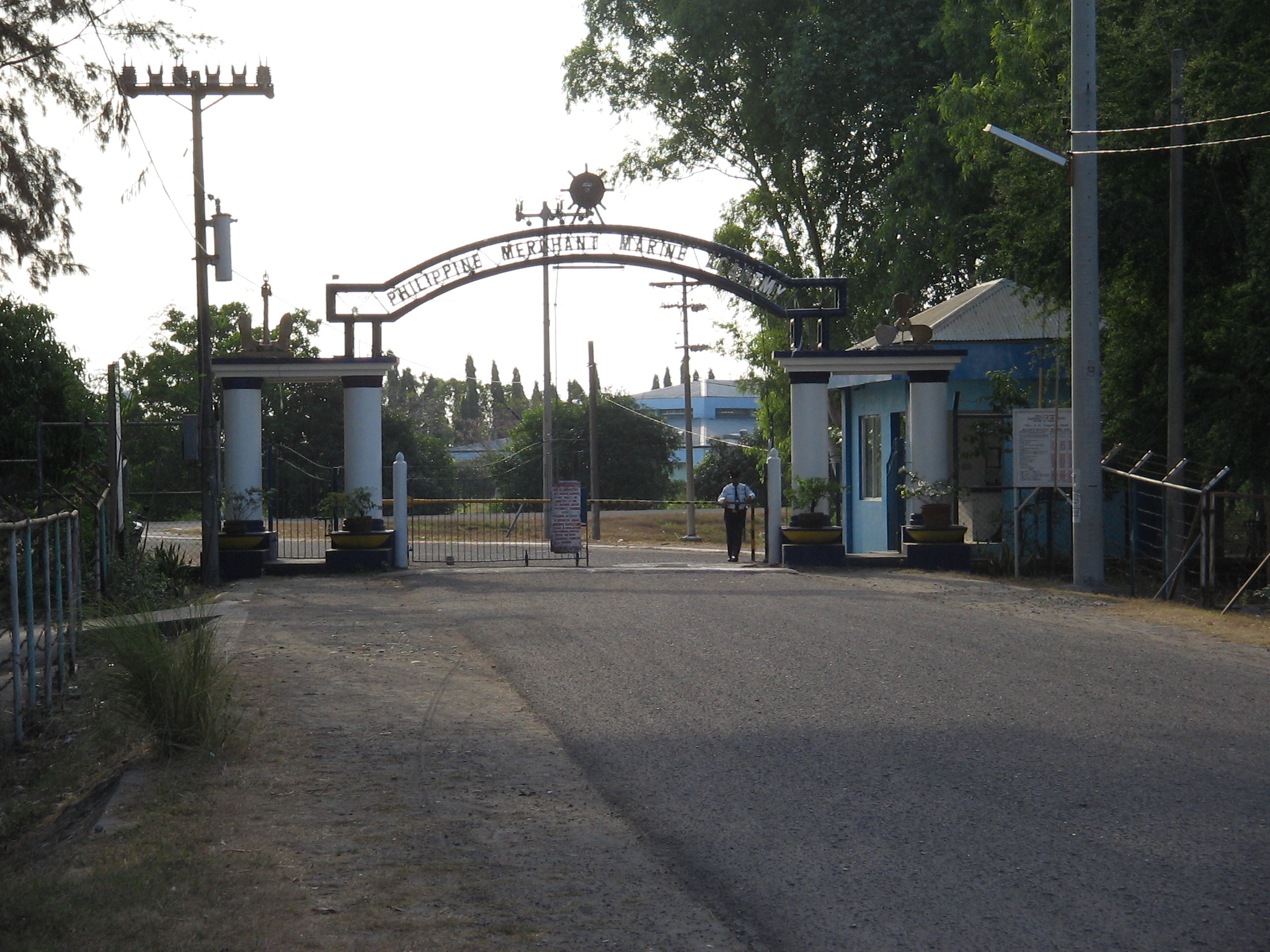 Entrance to PMMA